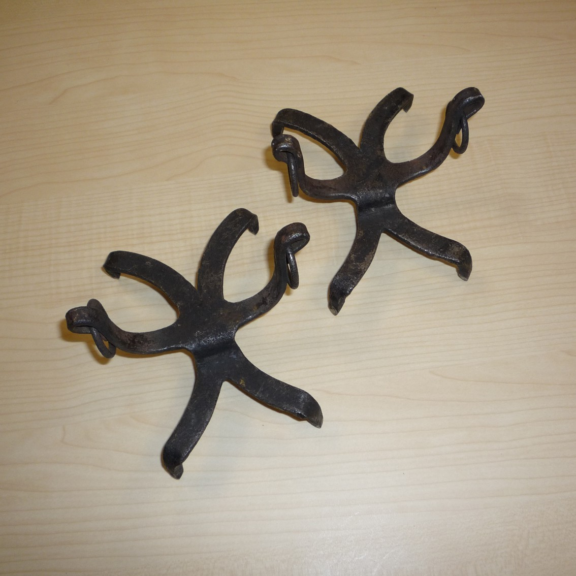 historische Grödeln, geschmiedet, Ende 19. Jahrhundert